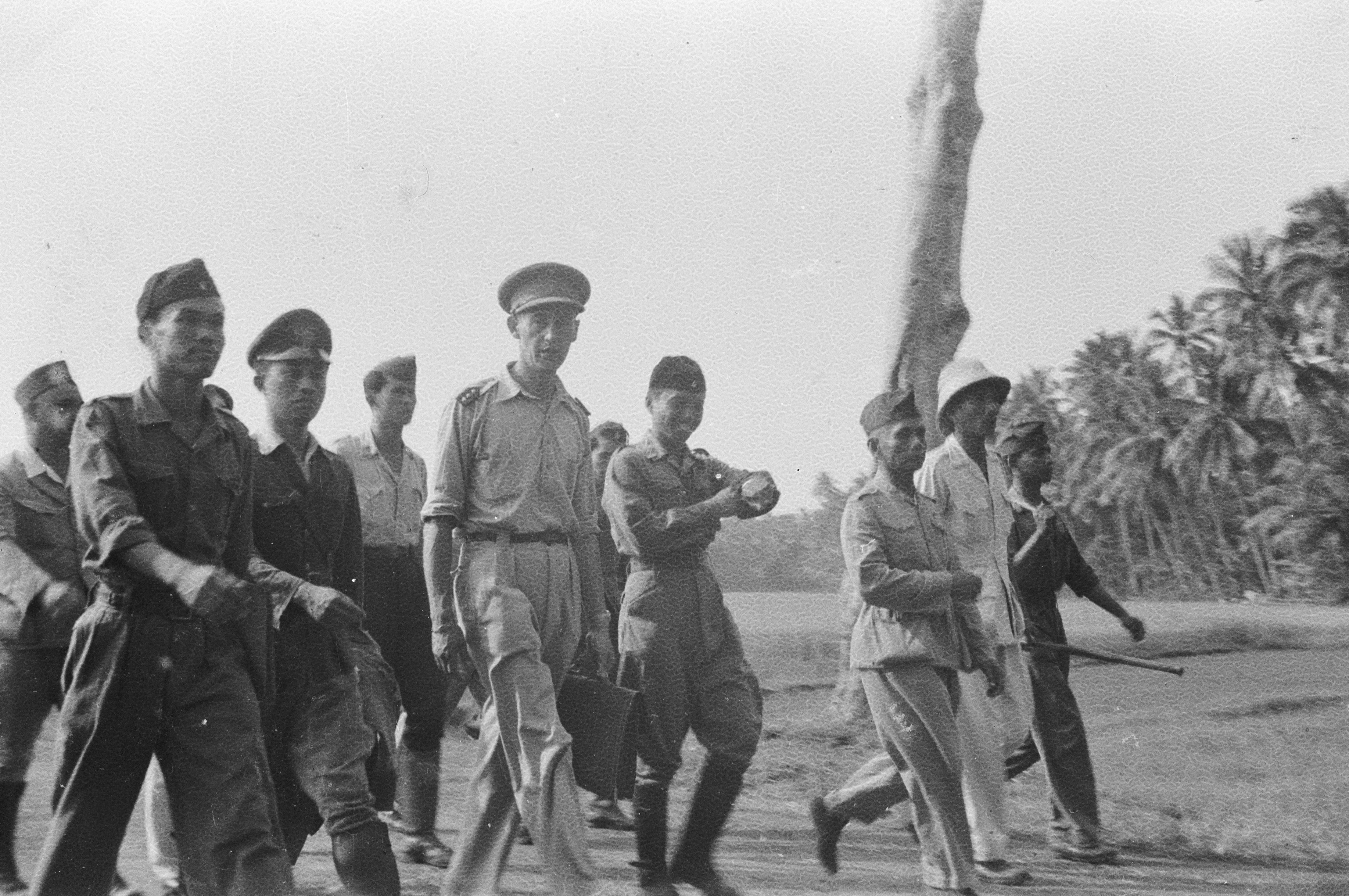 Collectie / Archief : Fotocollectie Dienst voor Legercontacten Indonesië Reportage / Serie : [DLC] Kemit bij Gombong aan de Status Quo-lijn; Besprekingen Beschrijving : [de Republikeinse delegatie arriveert lopend in gezelschap van een buitenlandse officier. Op de voorgrond een KNIL militair] Annotatie : Een van de delegatieleden kijkt lachend op zijn horloge Datum : 24 januari 1948 Locatie : Indonesië, Krawang, Nederlands-Indië, Nederlands-Indië Fotograaf : Taillie, J.C. / DLC Auteursrechthebbende : Nationaal Archief Materiaalsoort : Negatief (zwart/wit) Nummer archiefinventaris : bekijk toegang 2.24.04.03 Bestanddeelnummer : 1509-4-3